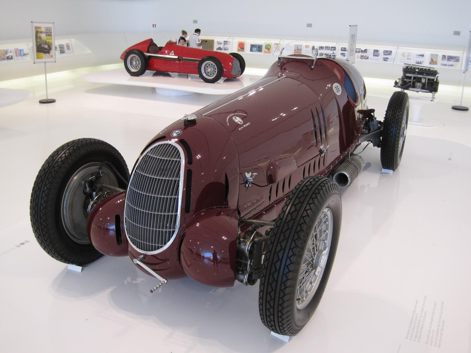 Automobiles in Enzo Ferrari Museum in Modène - Alfa Roméo Type C - V12 - 1936